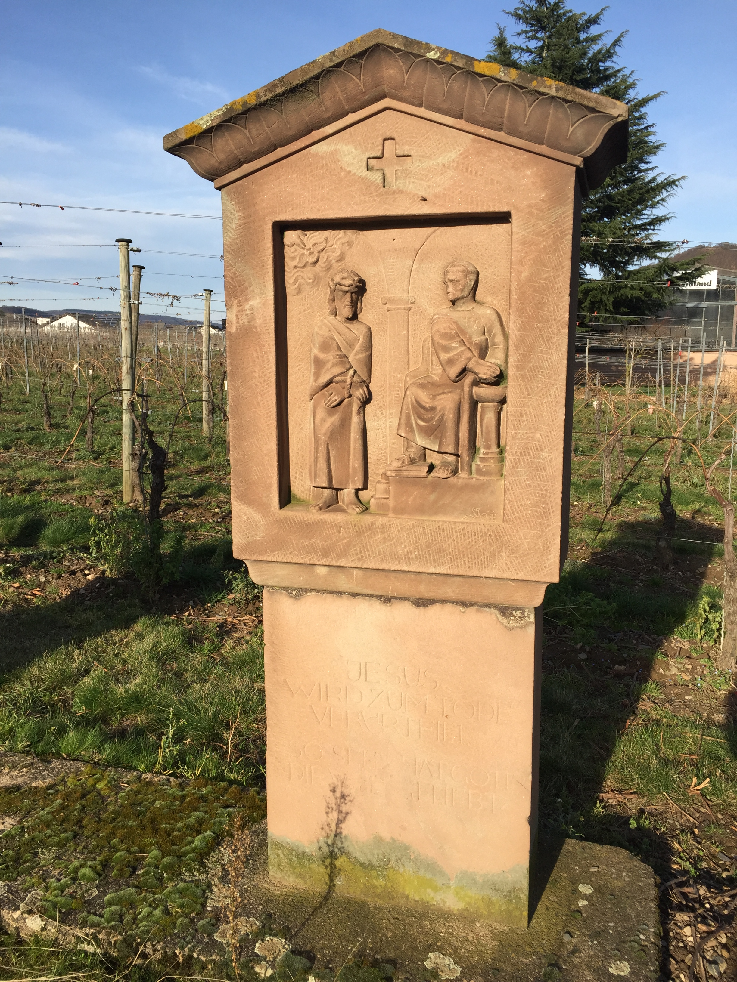 Kreuzweg Trittenheim - Station 1 von 14